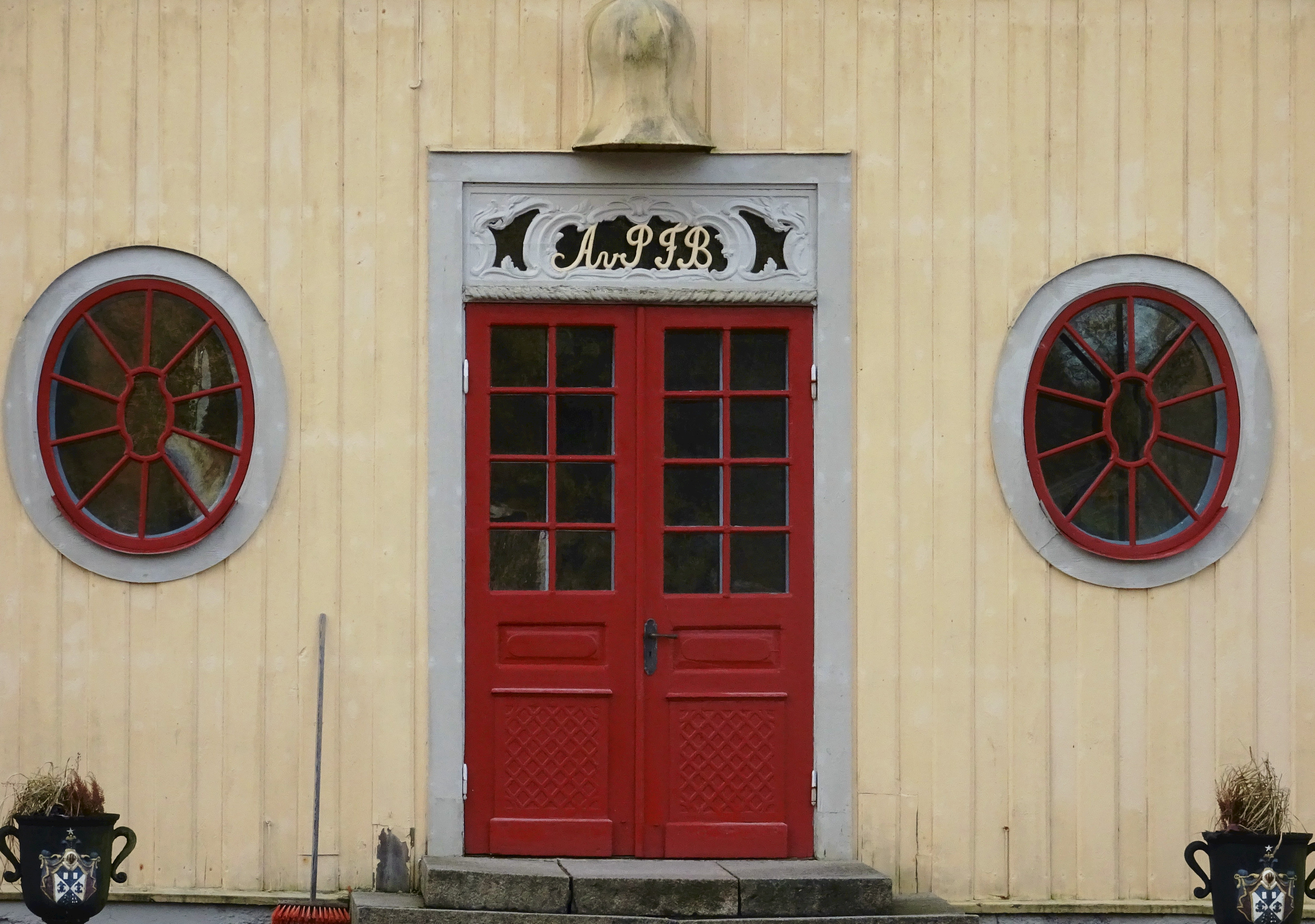 Måstena huvudbyggnad entré